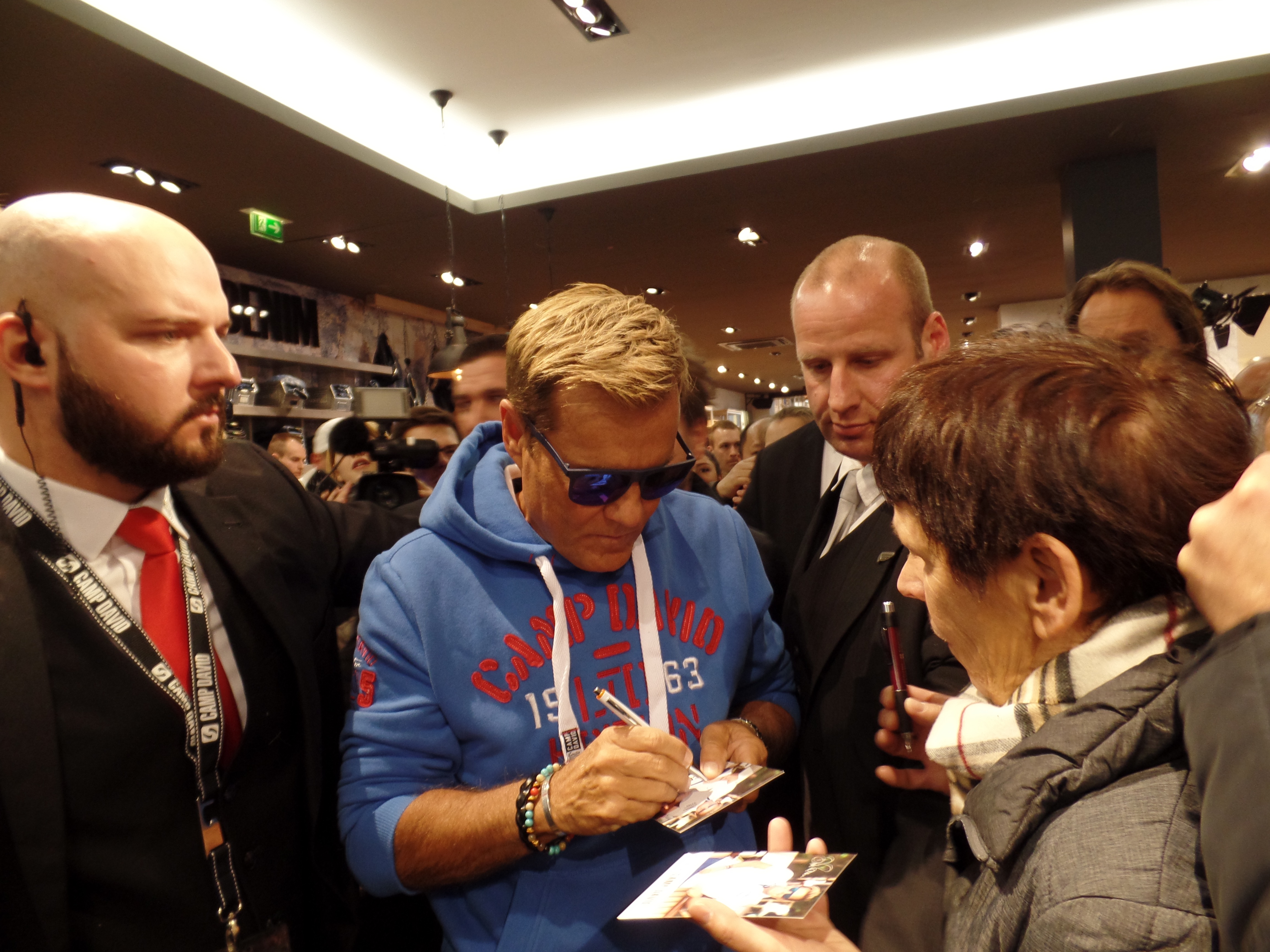 Dieter Bohlen in Oldenburg zur Camp David-Storeeröffnung